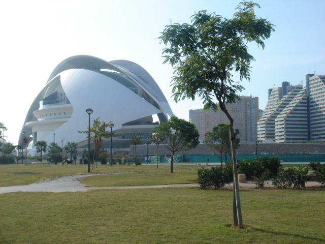 Palau de las Arts en Valencia Comunidad Valenciana. España